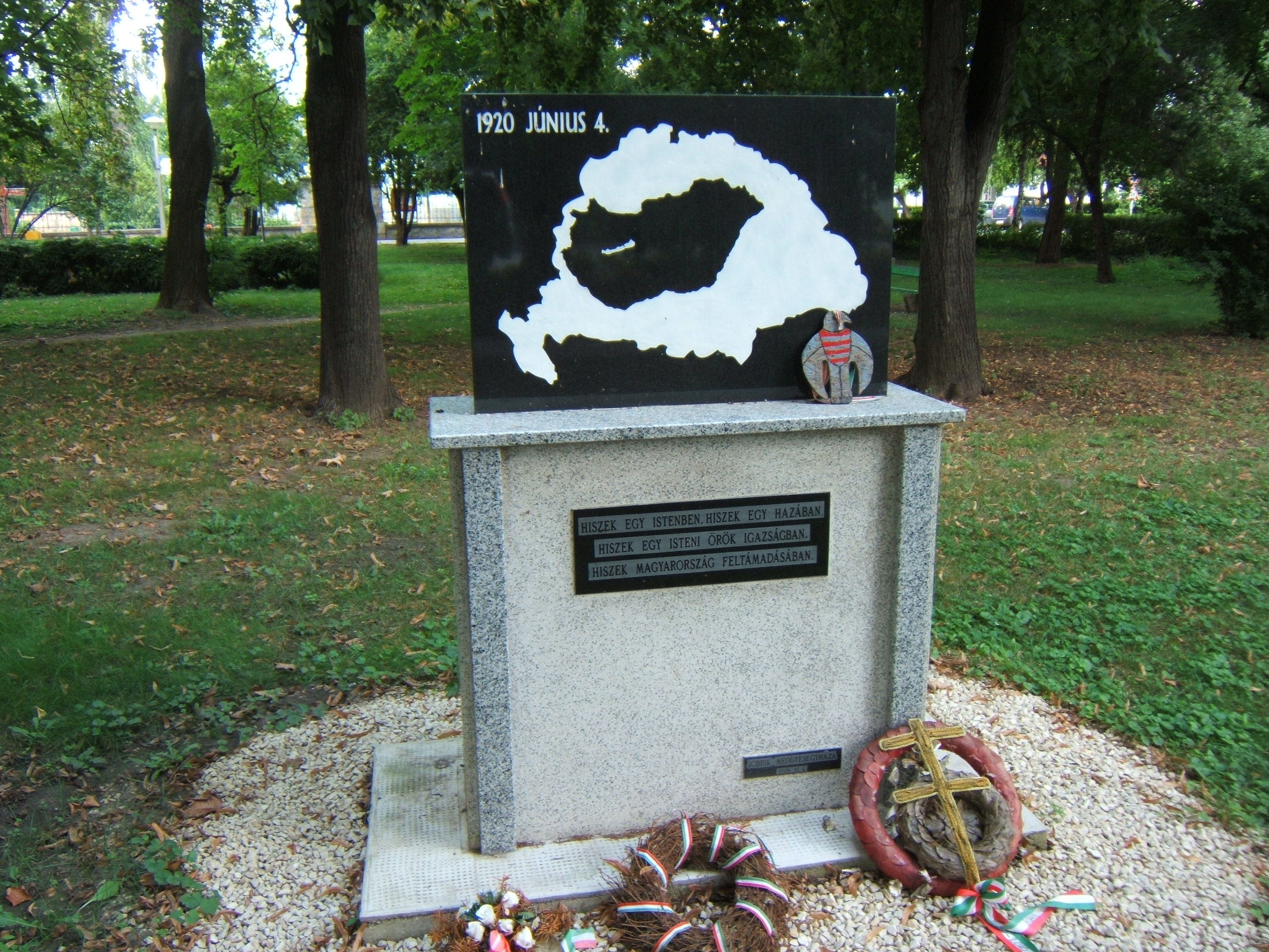 Trianon-emlékmű, Medgyesegyháza